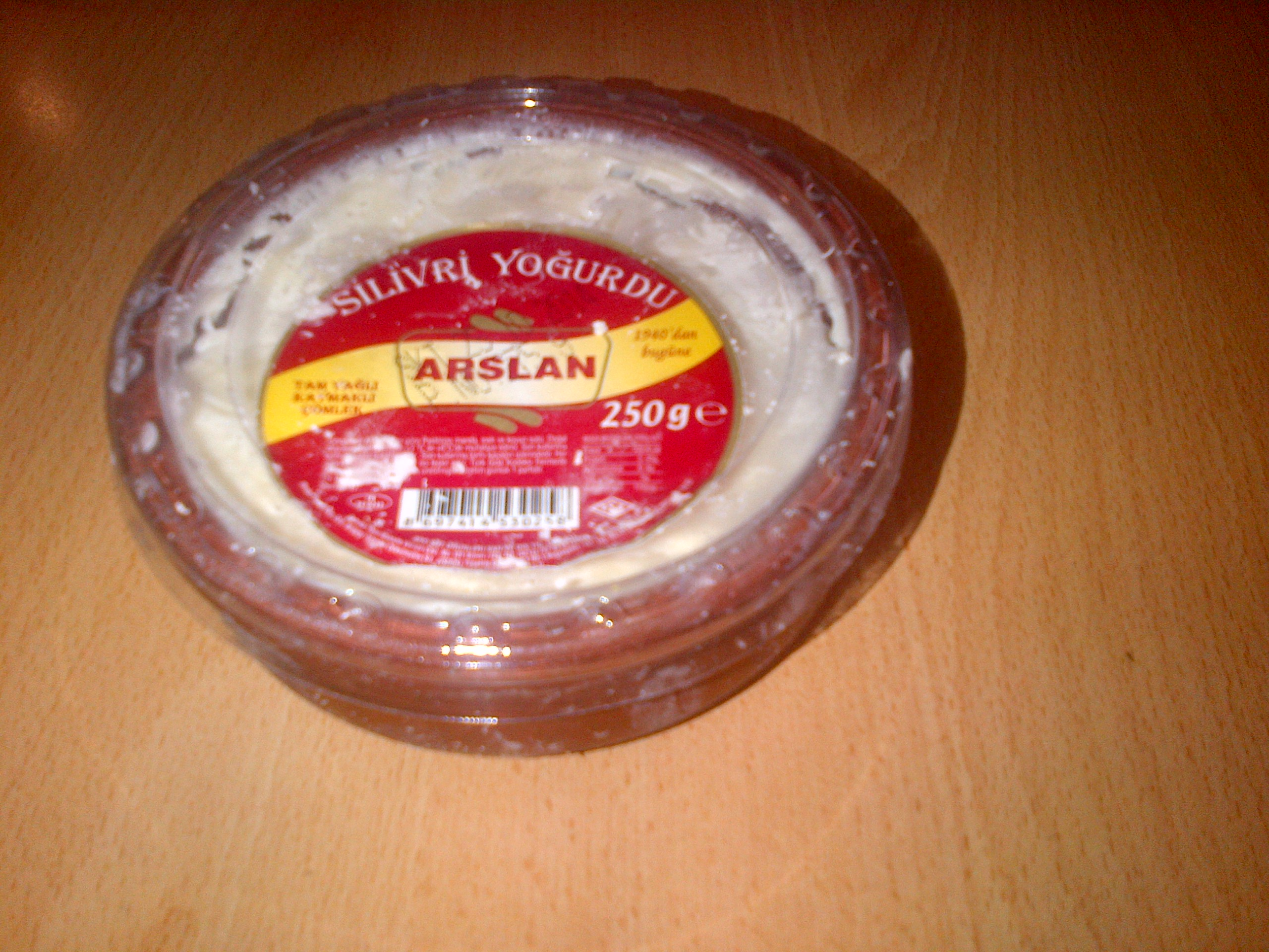 Un recipiente de barro con el famoso yogurt de bufala de Silivri, Estambul.